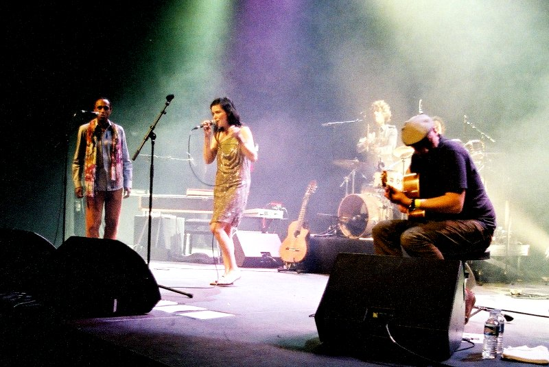 Nouvelle Vague @ Le Cargö - Caen